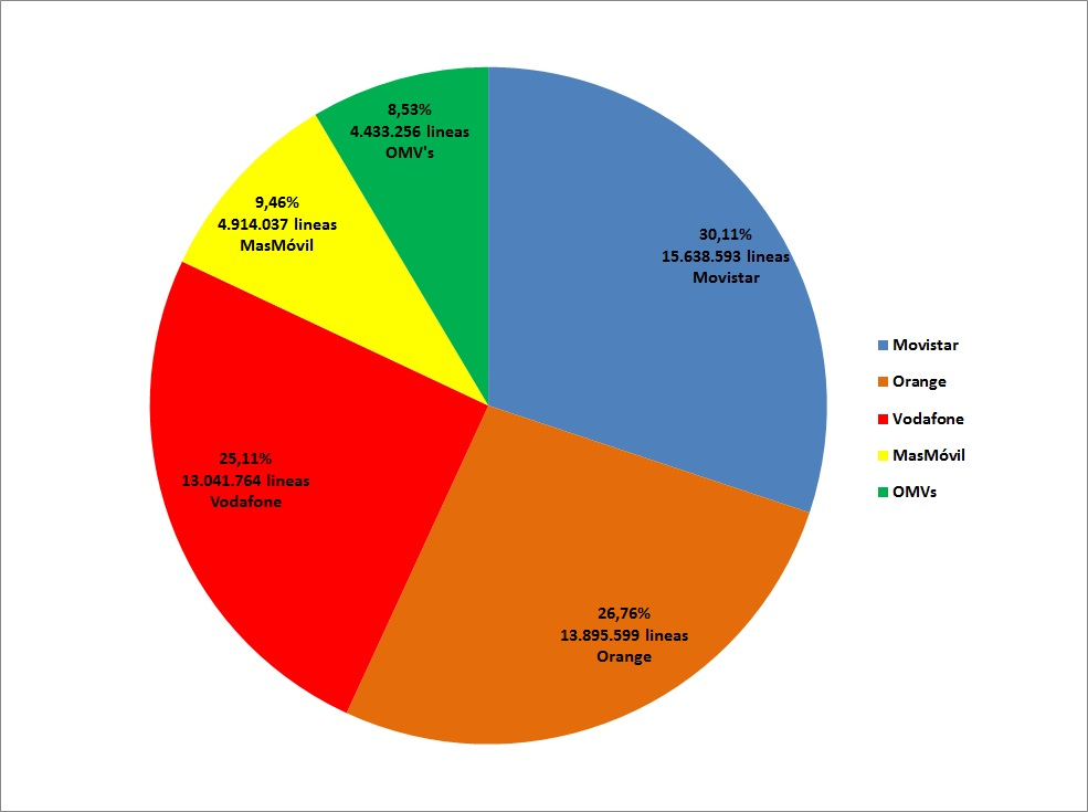 Lineas moviles noviembre 2017